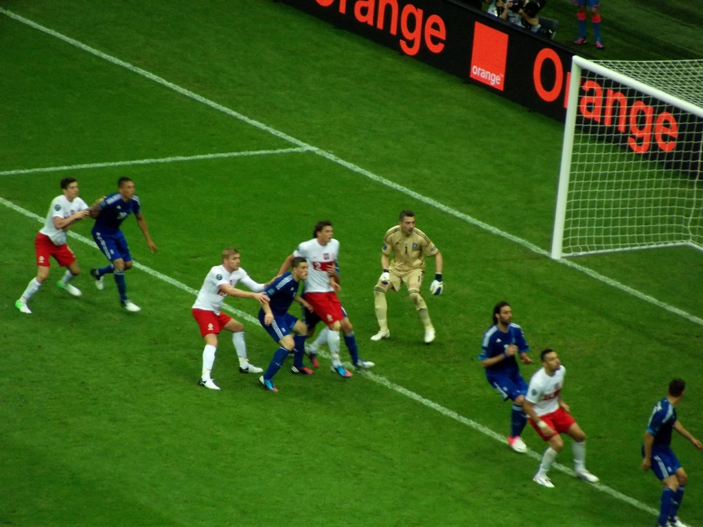 Zdjęcie zrobione w pierwszym dniu UEFA Euro 2012 w Warszawie, dniu otwarcia turnieju i meczu Polska-Grecja.